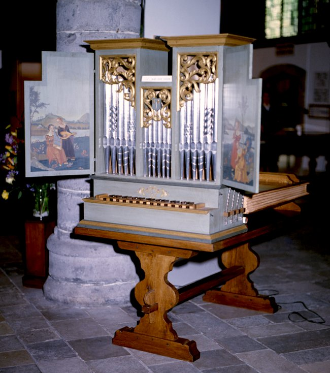 Tischpositiv, Germany, 1978